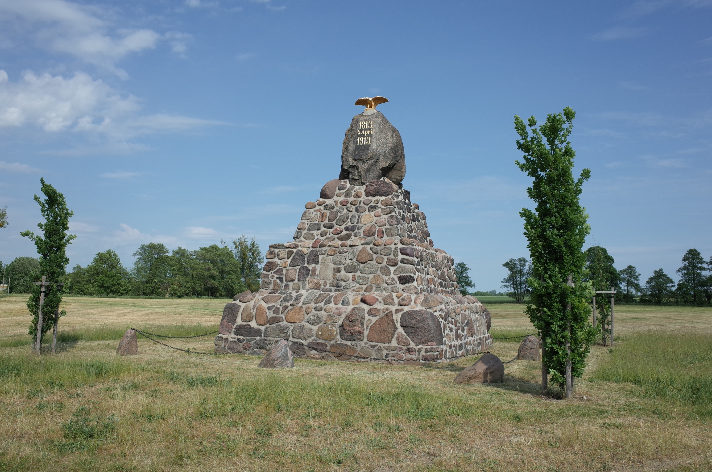 Gommern, Denkmal im Ortsteil Vehlitz